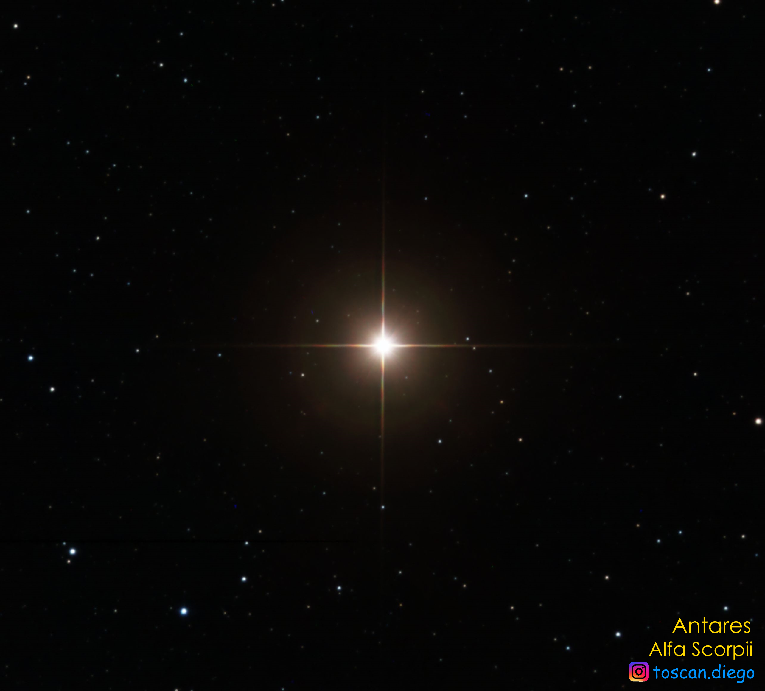 Estrella Antares, foto tomada el 12/5/2020